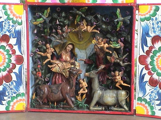 Retablo Ayacuchano sobre el nacimiento de Jesús.